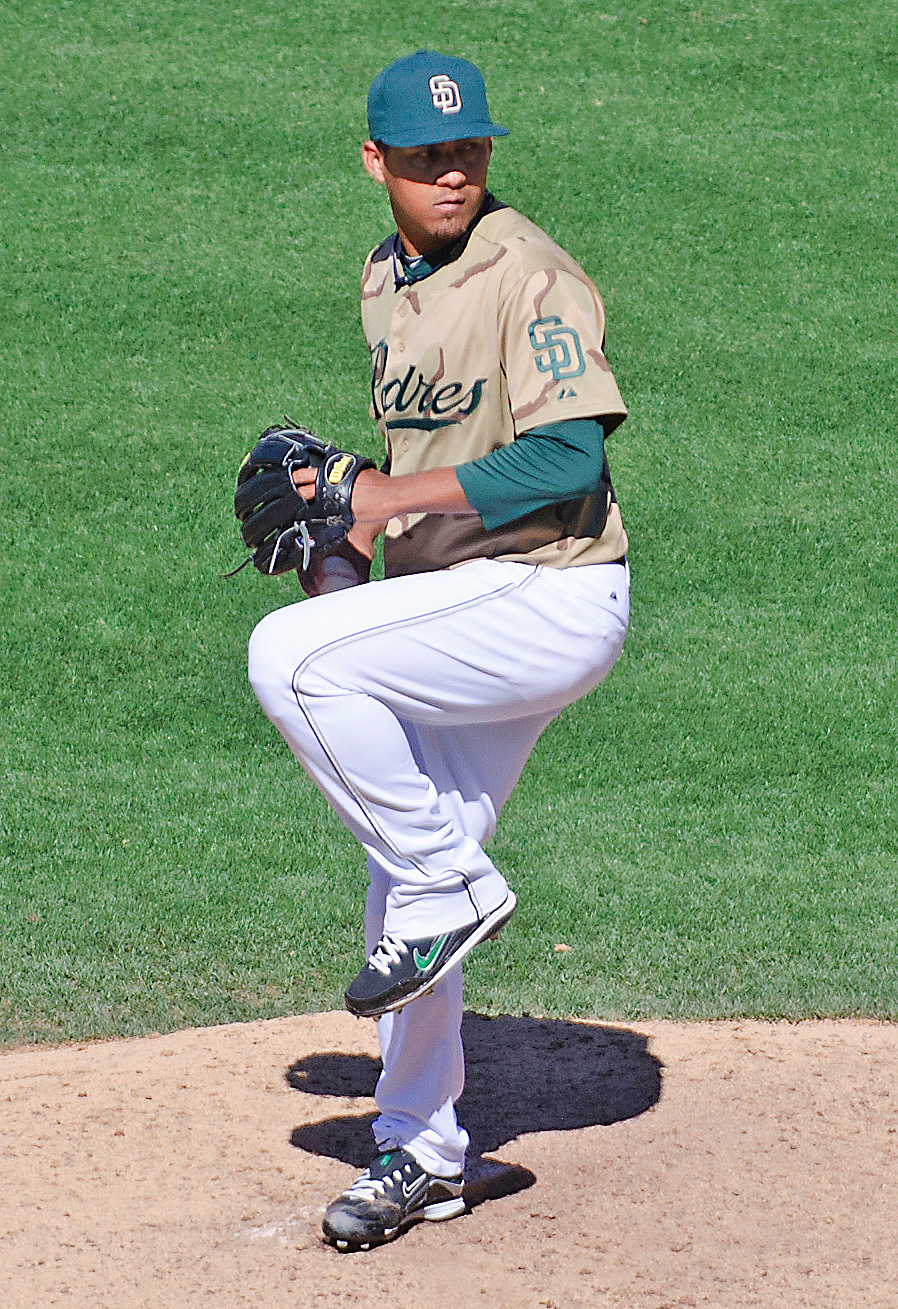 Ernesto Frieri